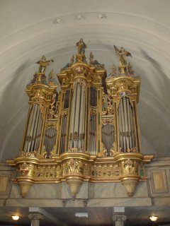 Kyrkorgel, Bälinge kyrka. Foto Olof Ekström 2004